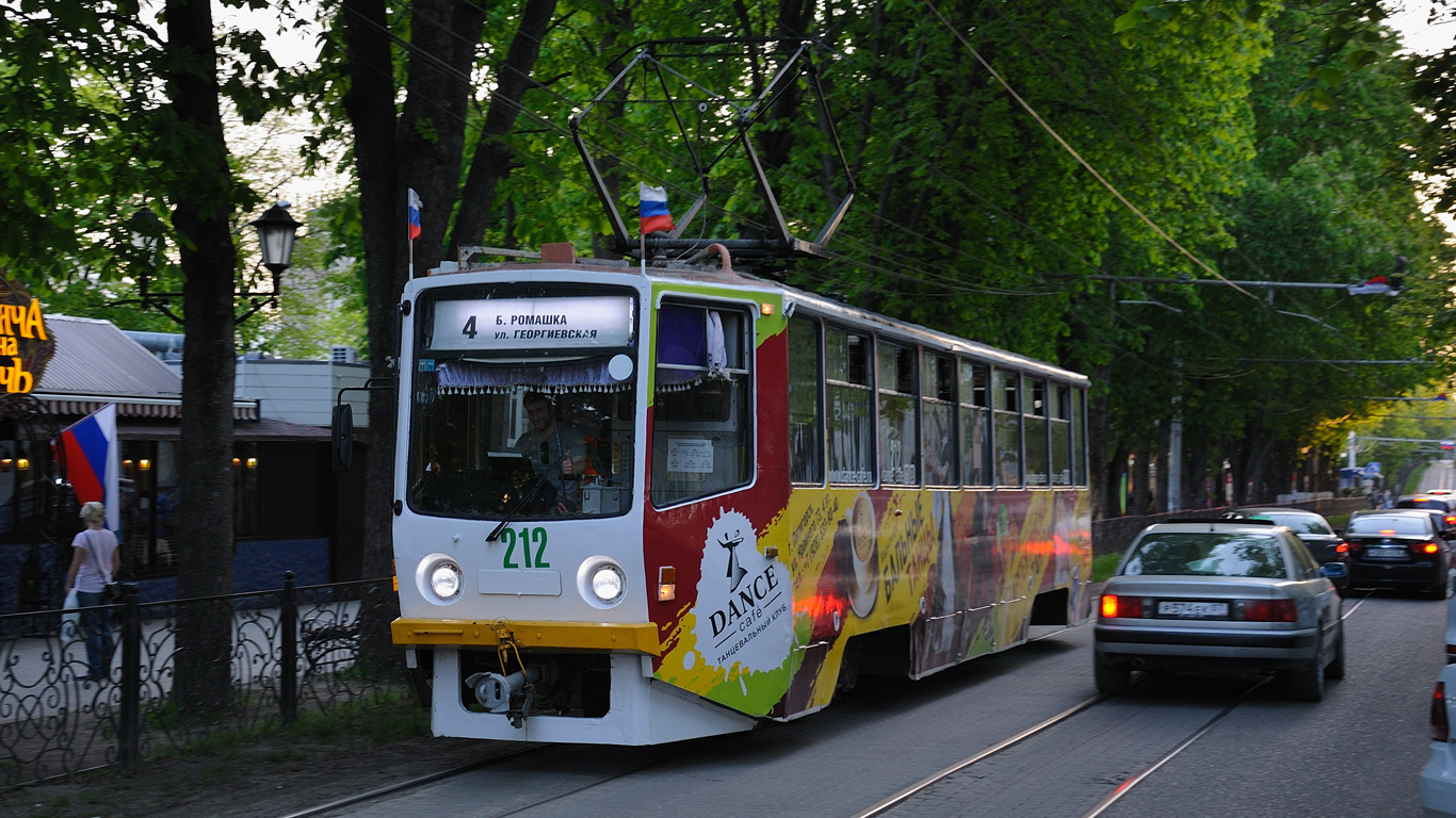 Трамвай 71-615 номер 212, улица Кирова, Пятигорск.